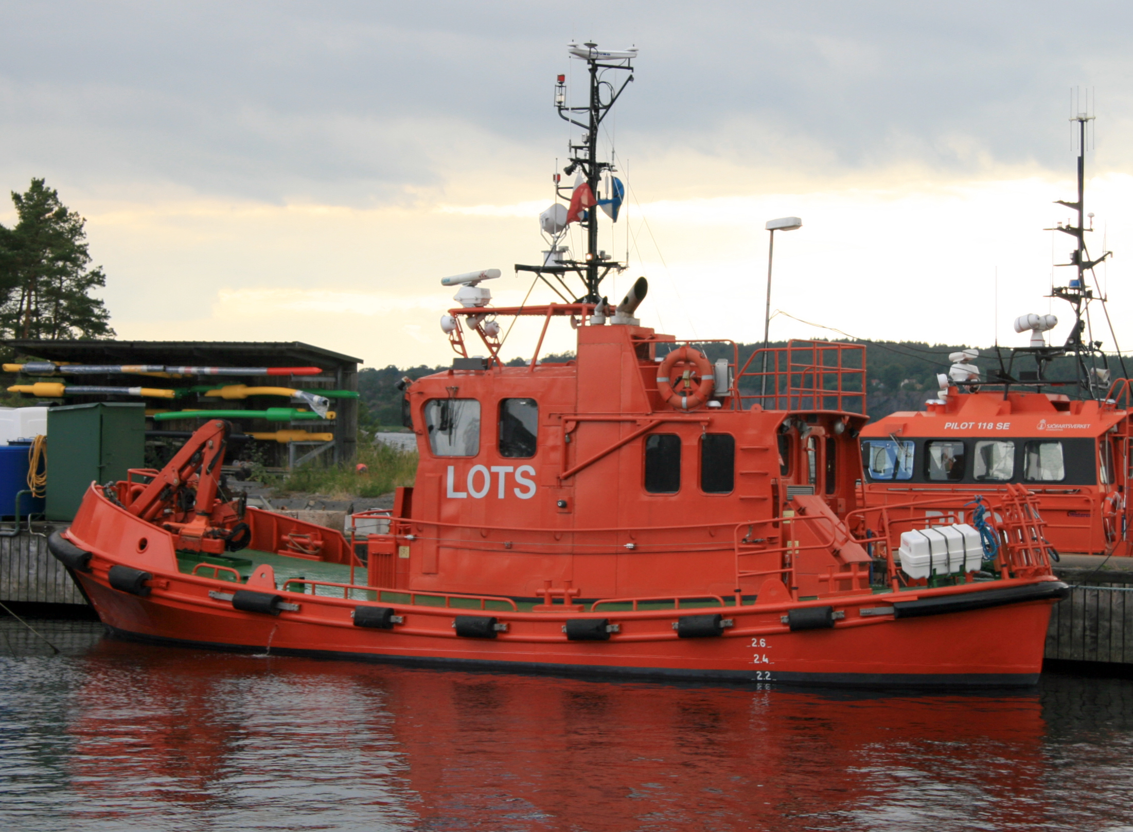 Pilot 777 SE i Karlshamn 15 juli 2008